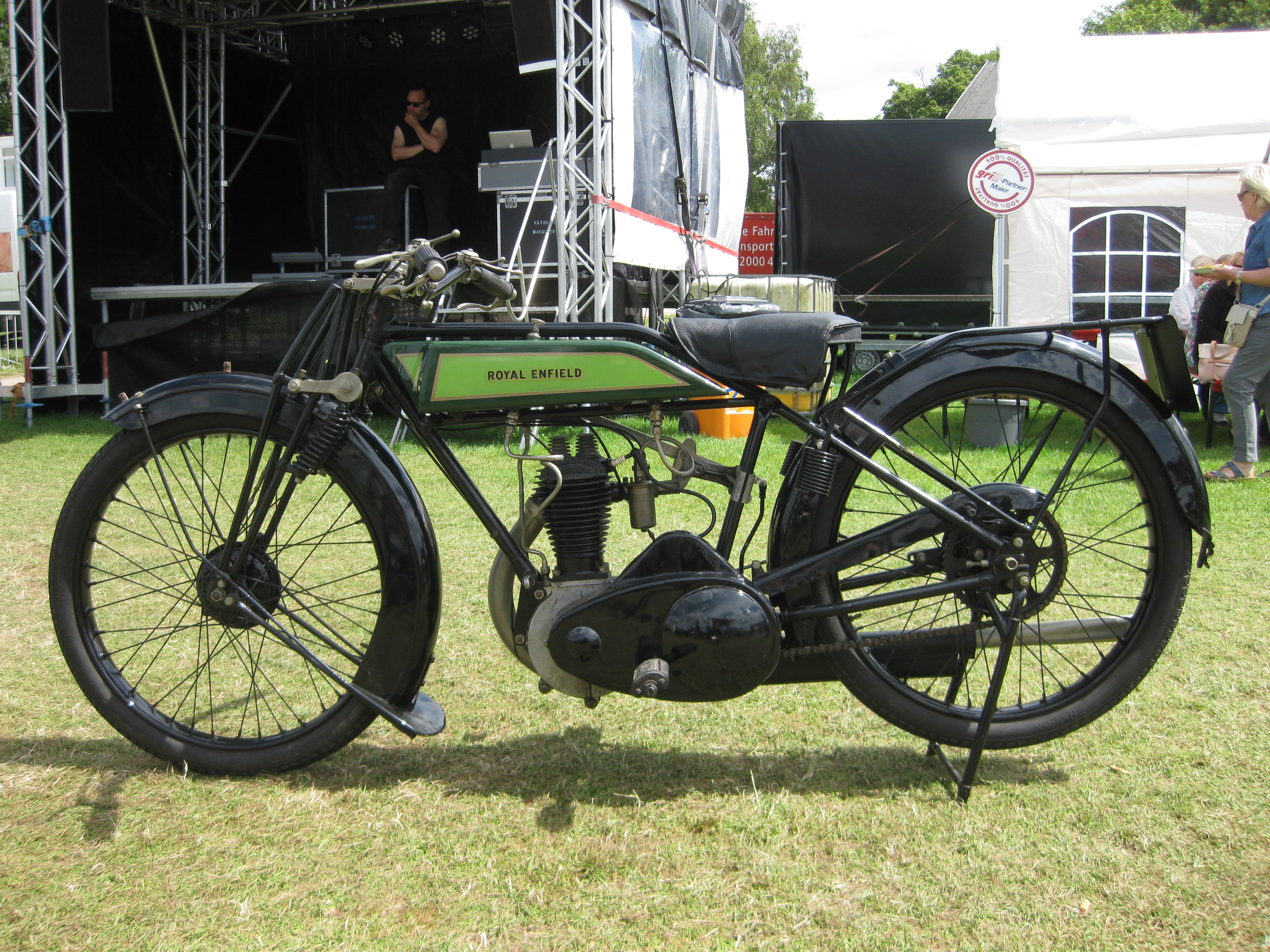 Royal Enfield Seitenansicht